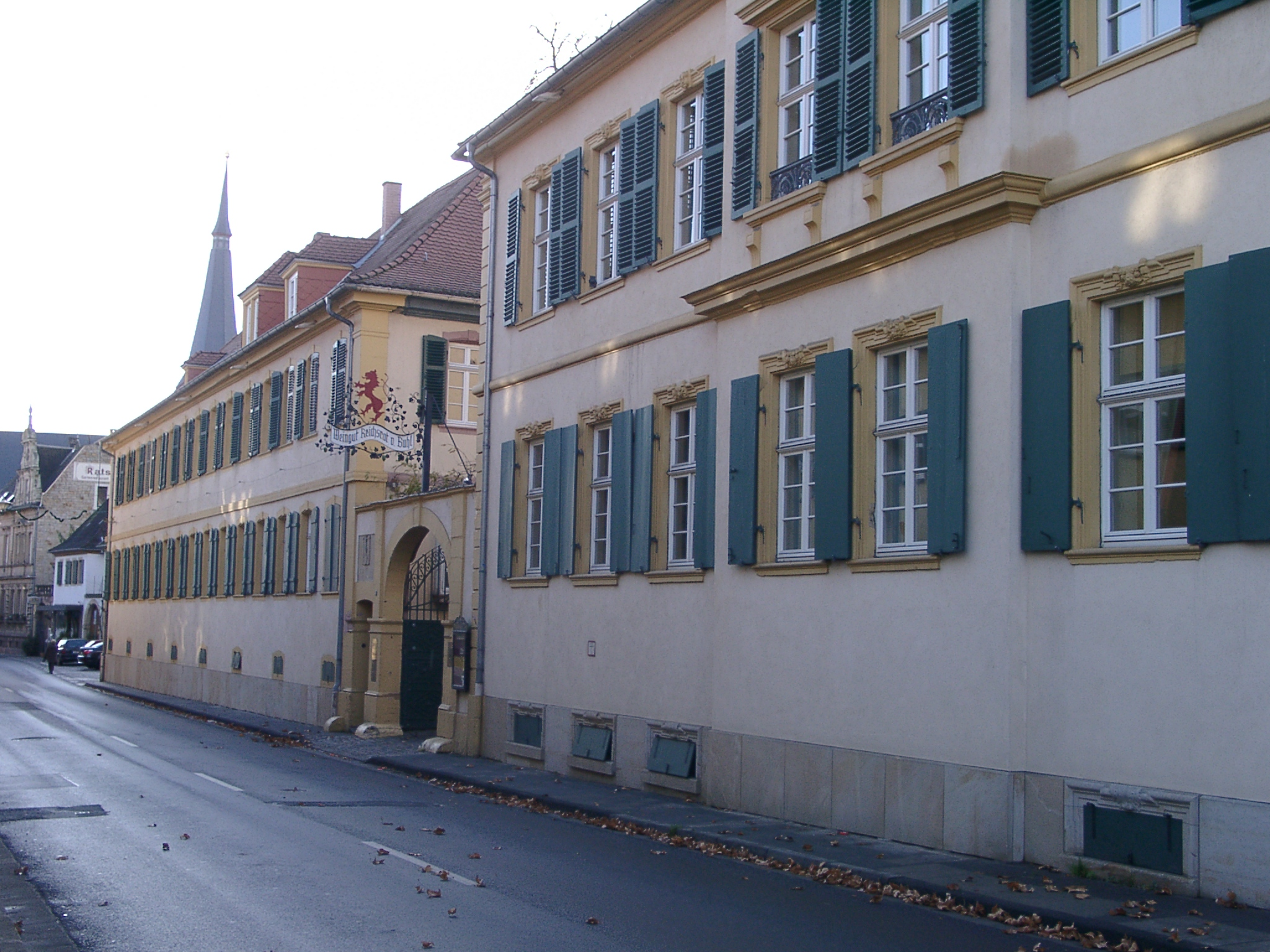 Das Herrenhaus des Weinguts Reichsrat von Buhl